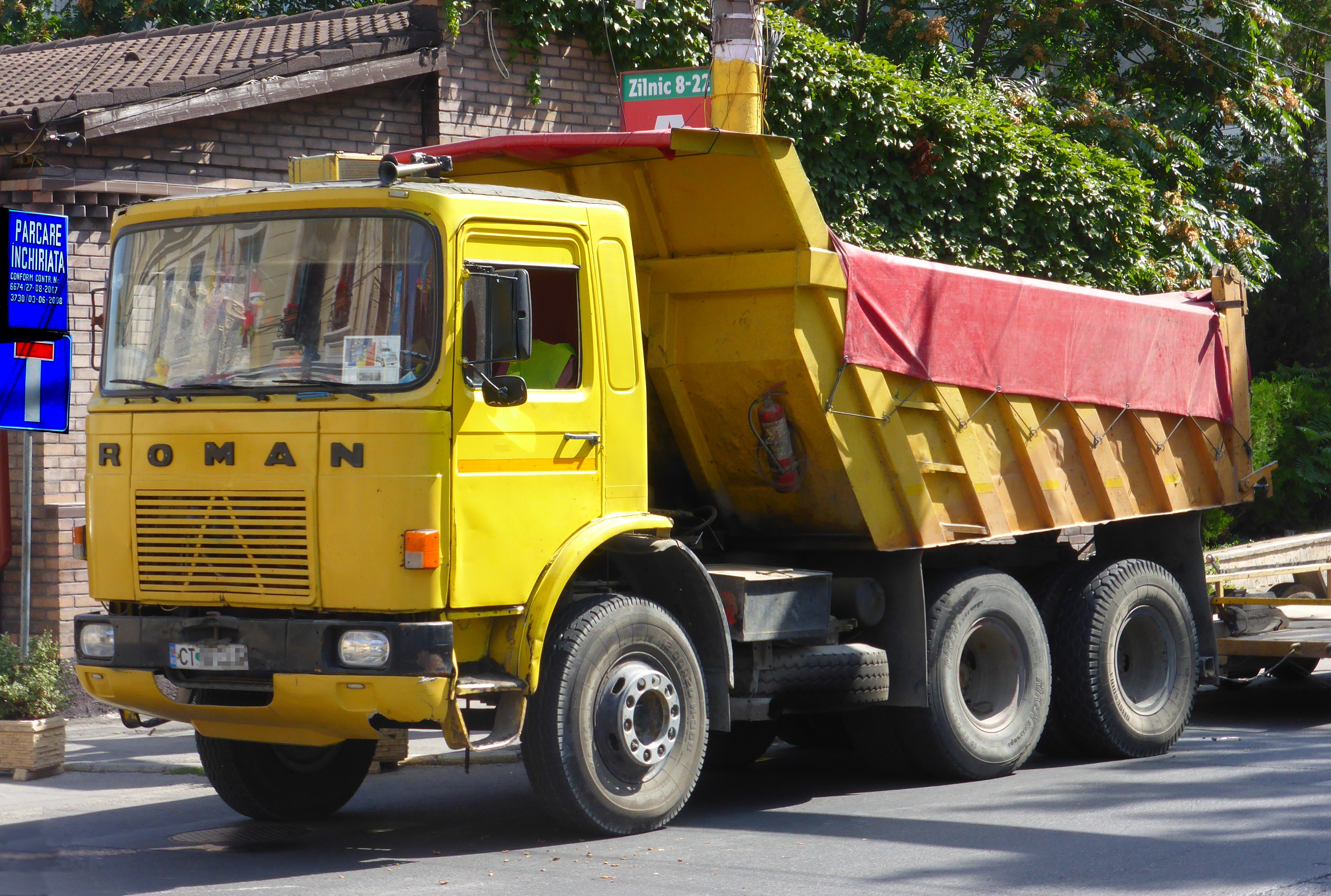 Ein Roman-Kipper in Konstanza.